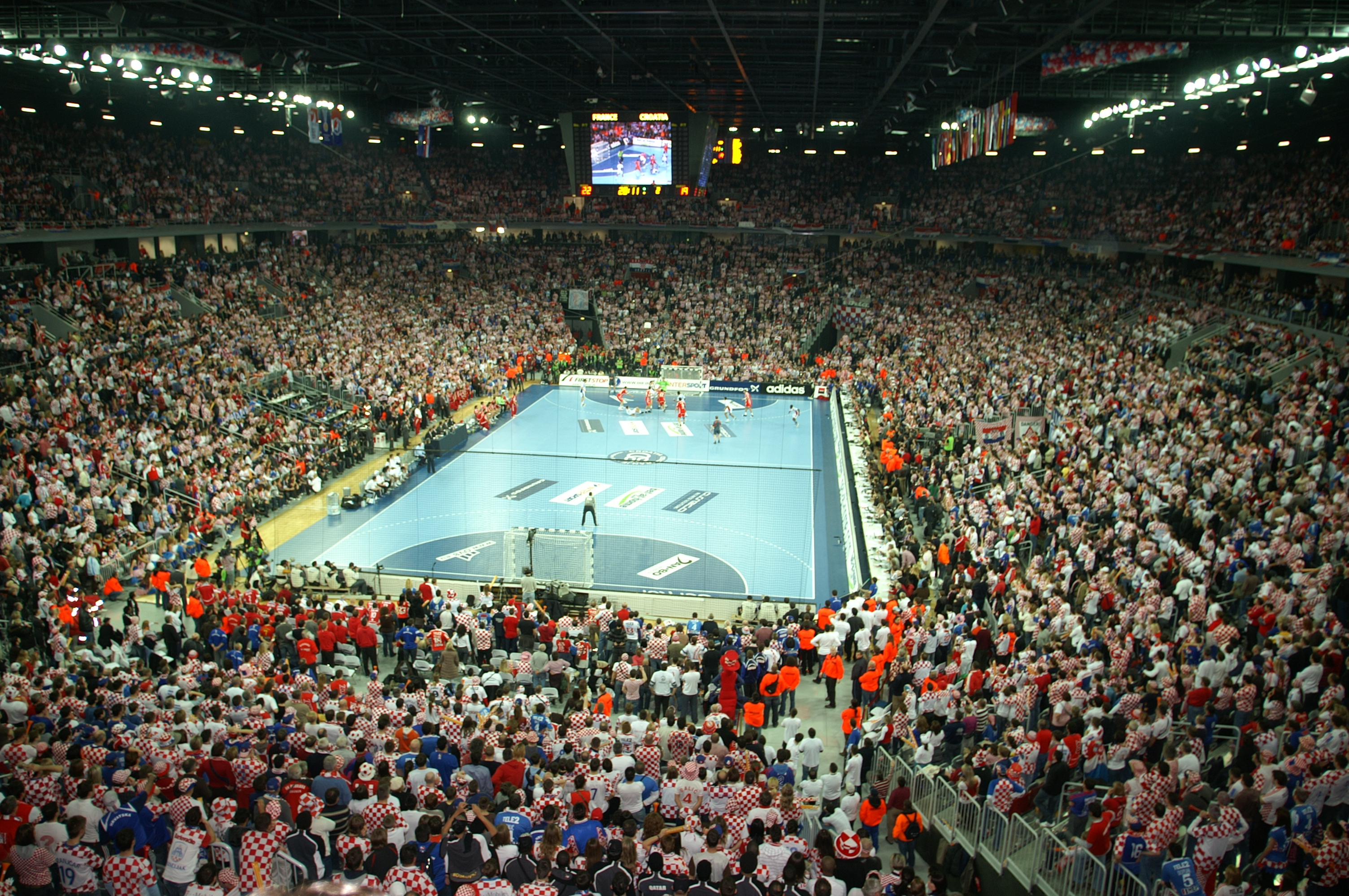 Ausverkaufte Arena zum Finalspiel der Handball WM 2009: Frankreich - Kroatien